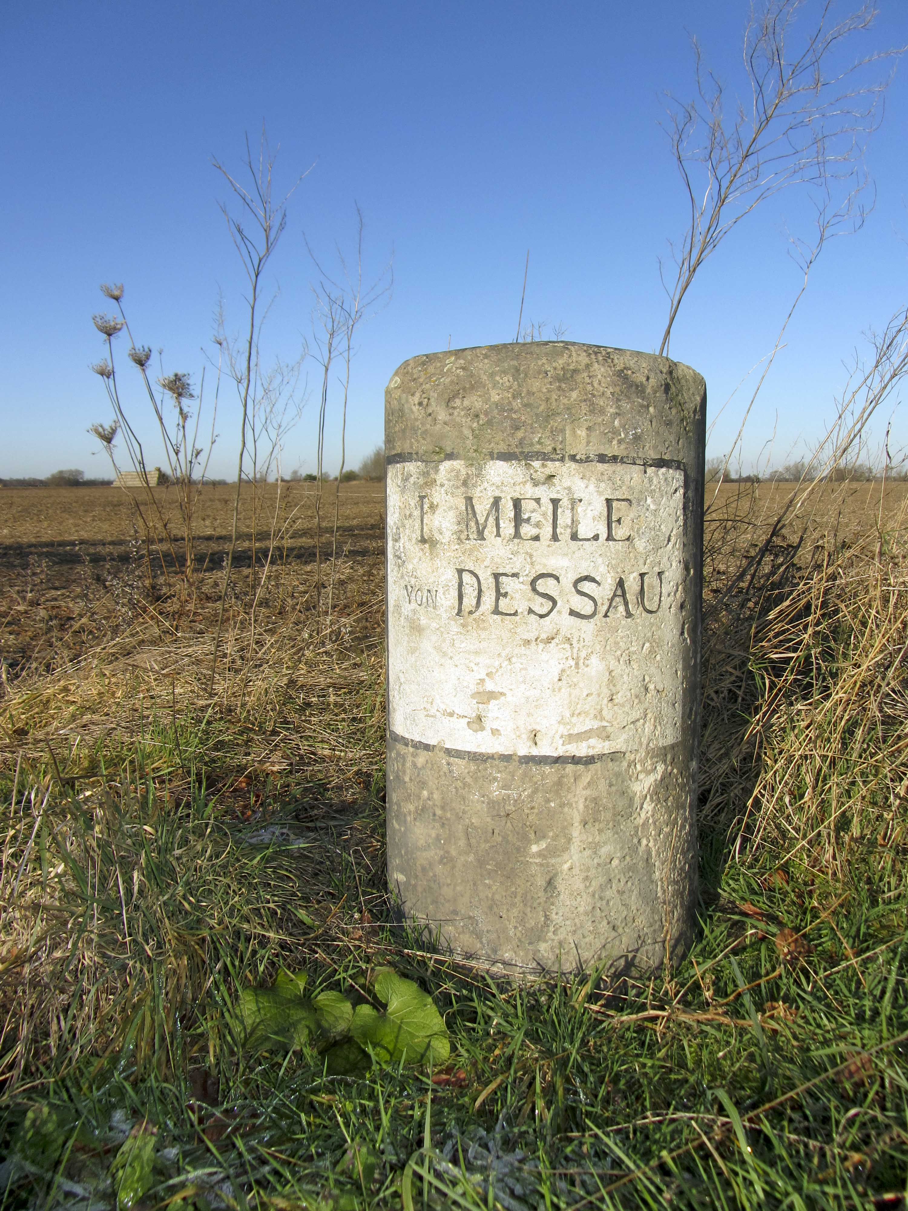 Anhaltischer Meilenstein an der L 134 zwischen Kochstedt und Quellendorf